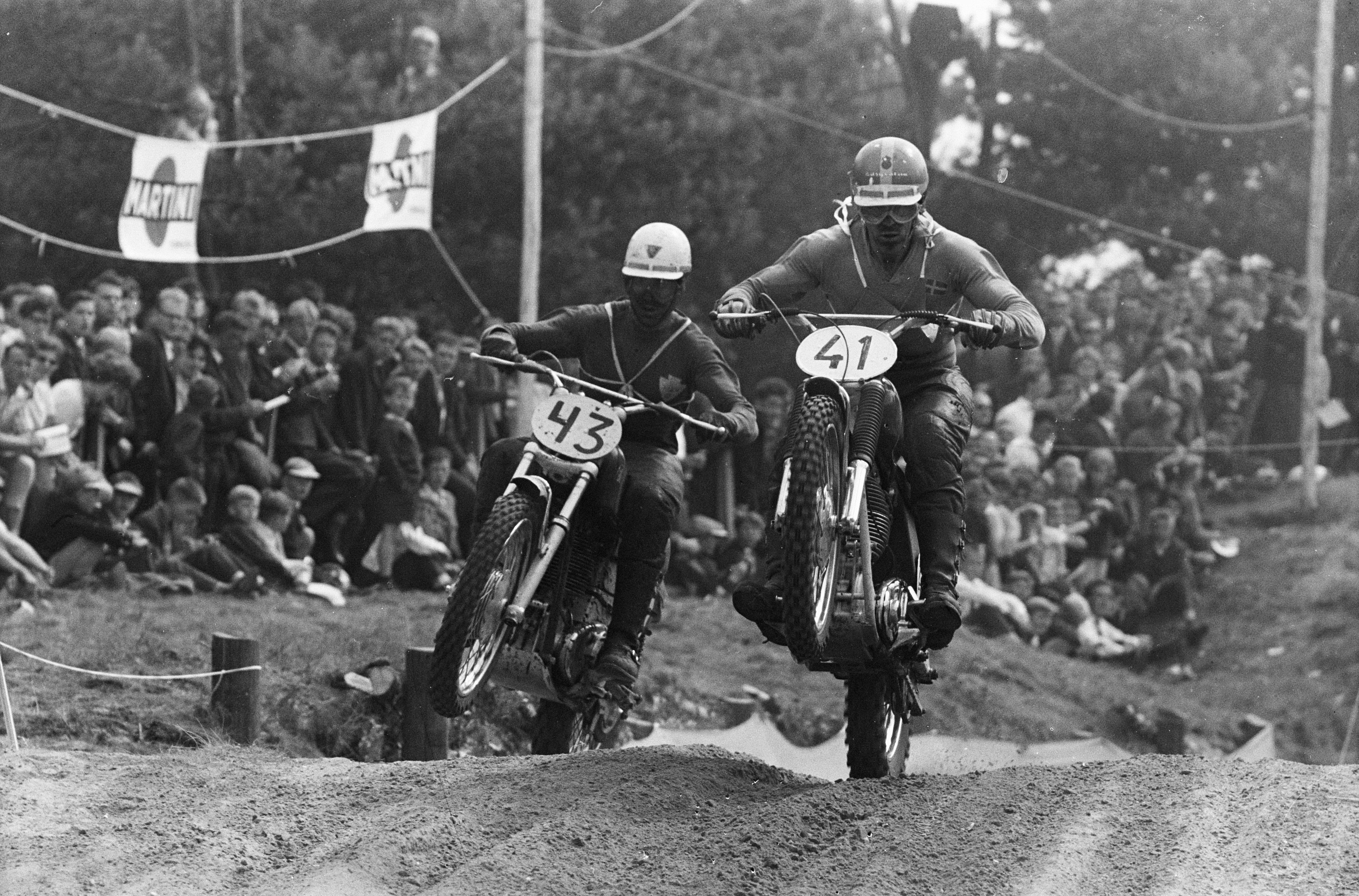 Collectie / Archief : Fotocollectie Anefo Reportage / Serie : [ onbekend ] Beschrijving : Grand Prix motorcros 1962 in Lichtevoorde 500 cc de twee Zweden G.J. Johansson en R. Tiblin in aktie Datum : 29 juli 1962 Locatie : Lichtenvoorde Trefwoorden : MOTORCROSS Persoonsnaam : G.J. Johansson, R. Tiblin Fotograaf : Pot, Harry / Anefo Auteursrechthebbende : Nationaal Archief Materiaalsoort : Negatief (zwart/wit) Nummer archiefinventaris : bekijk toegang 2.24.01.05 Bestanddeelnummer : 914-1637